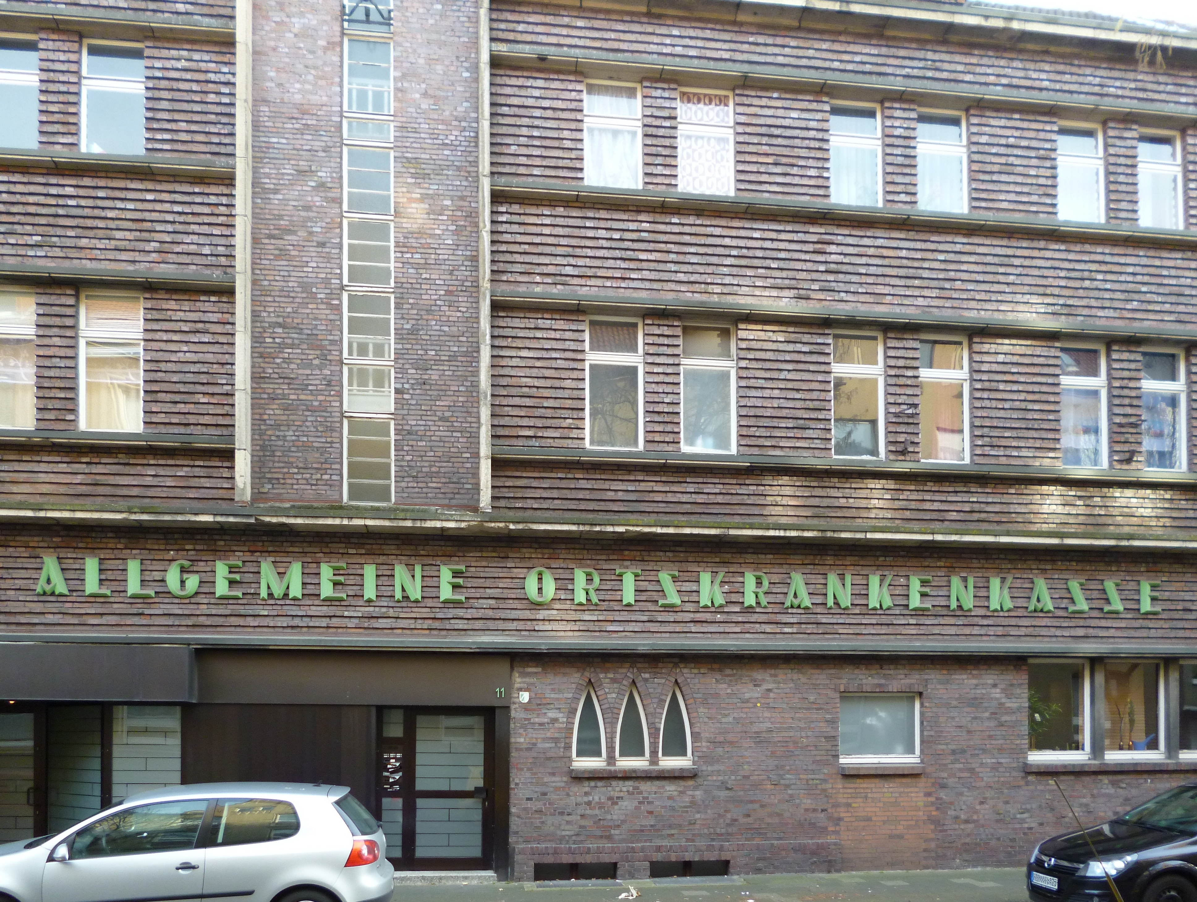 Herne-Wanne Märkische Straße 11